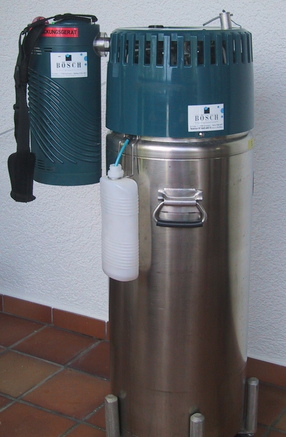 Flüssigsauerstofftank mit tragbarem Satellitentank